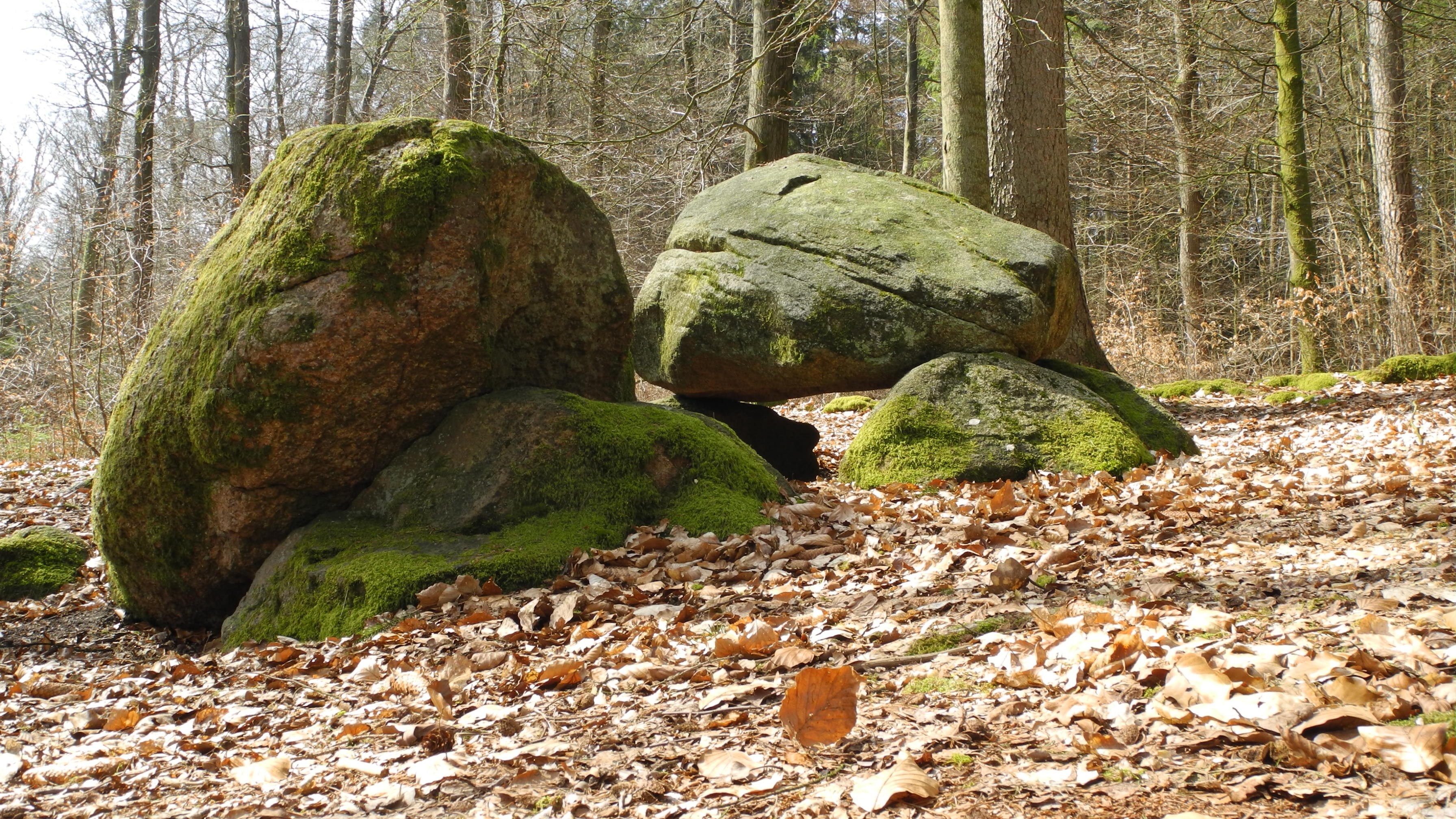 Wingst-Großsteingrab aus der Jungsteinzeit.JPG